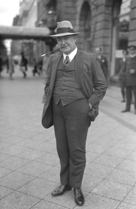 Edgar Wallace, der berühmte Kriminal-Schriftsteller, gestorben! Edgar Wallace, der auch in Deutschland bekannte Schriftsteller unzähliger Kriminal-Romane, ist in Hollywood im Alter von 56 Jahren an einer Lungenentzündung gestorben.